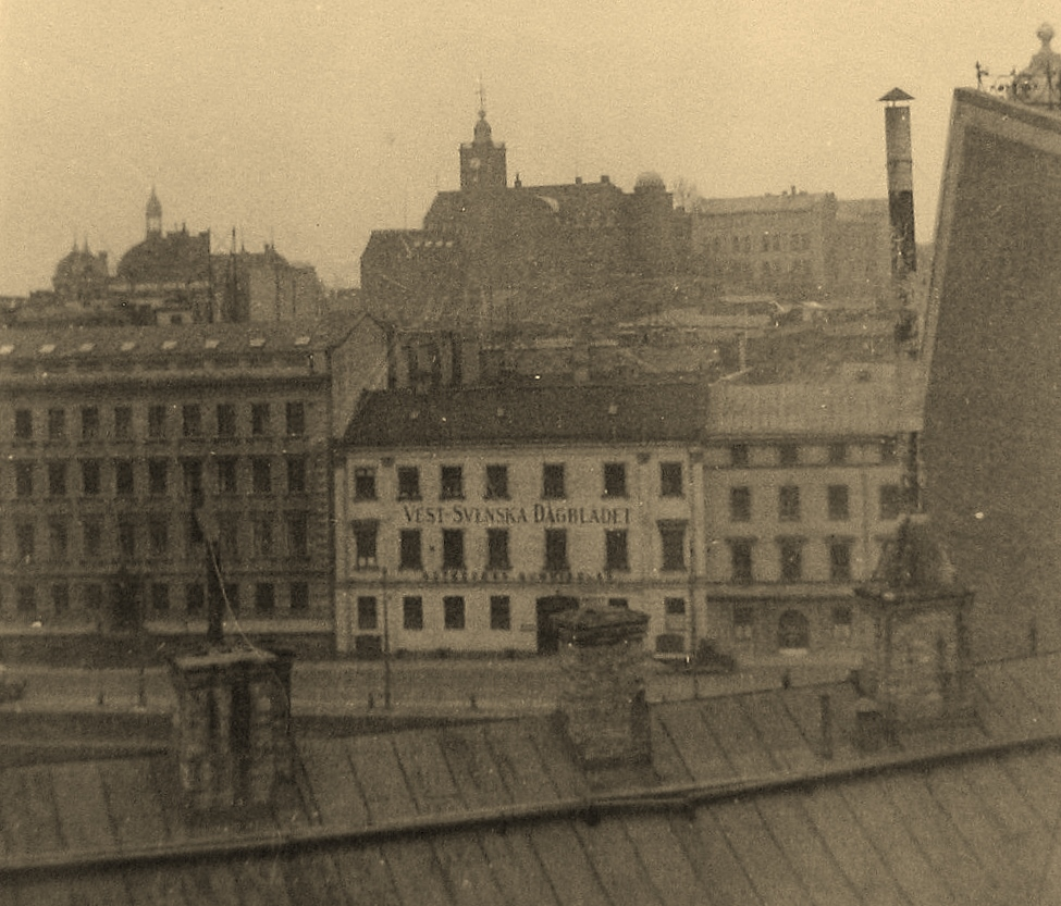 Vest-Svenska Dagbladets redaktion på Norra Hamngatan 8 ,(huset rivet före 1963). Till vänster Thamska huset och till höger Radheska huset. I bakgrunden syns Navigationsskolan. Kortet troligen taget från Domkyrkans torn.